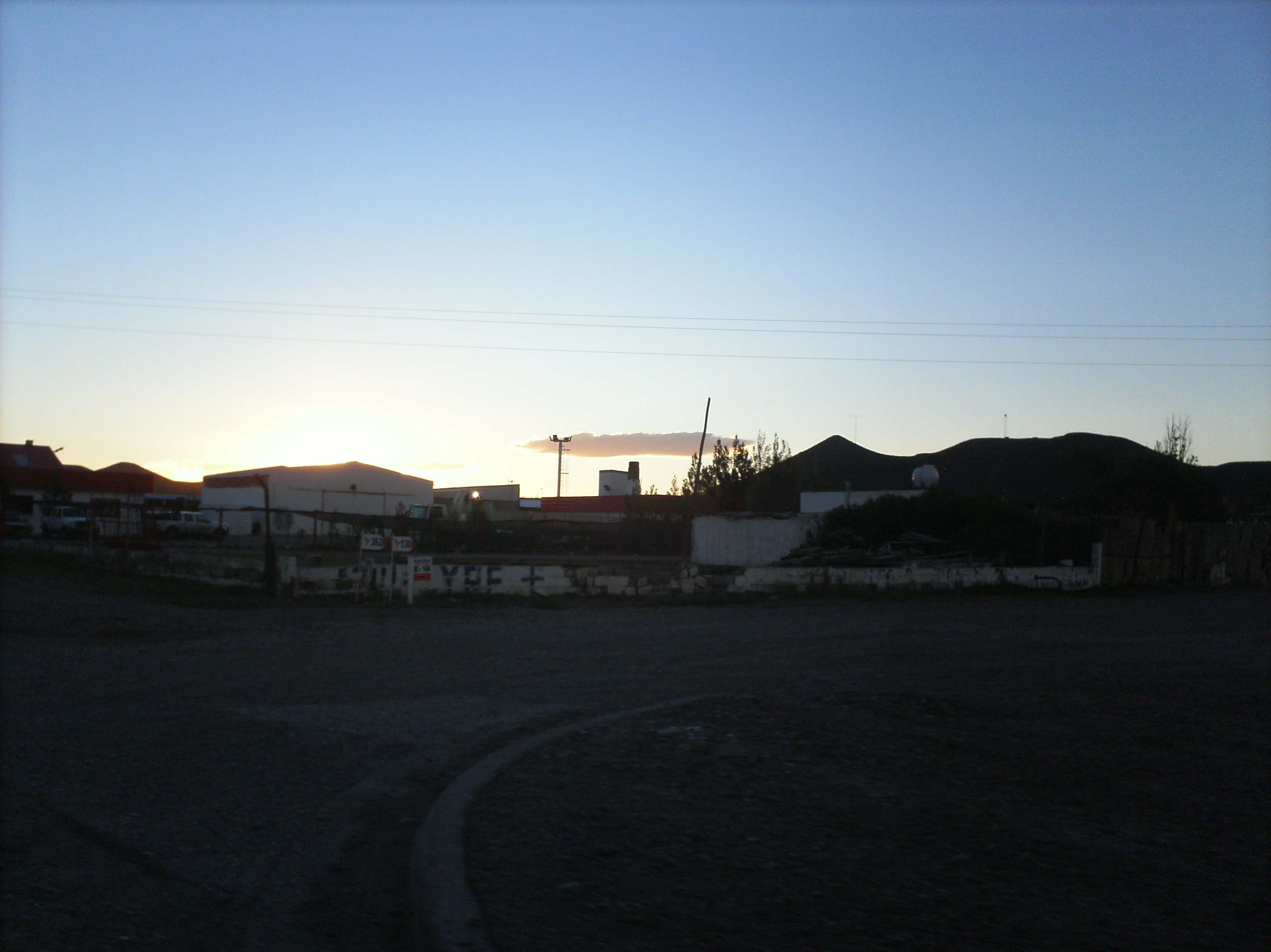 entrada ala localidad con su cerro